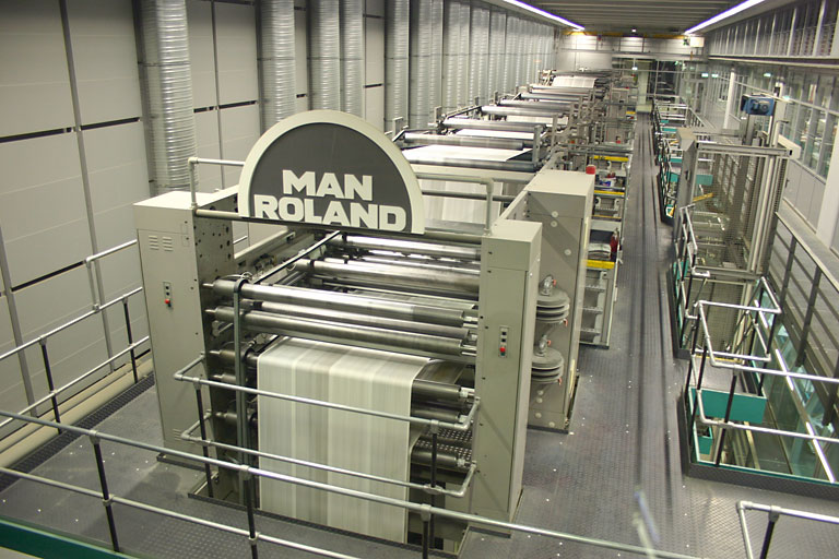 manroland Druckmaschine für den Rollenoffset- und Zeitungsdruck